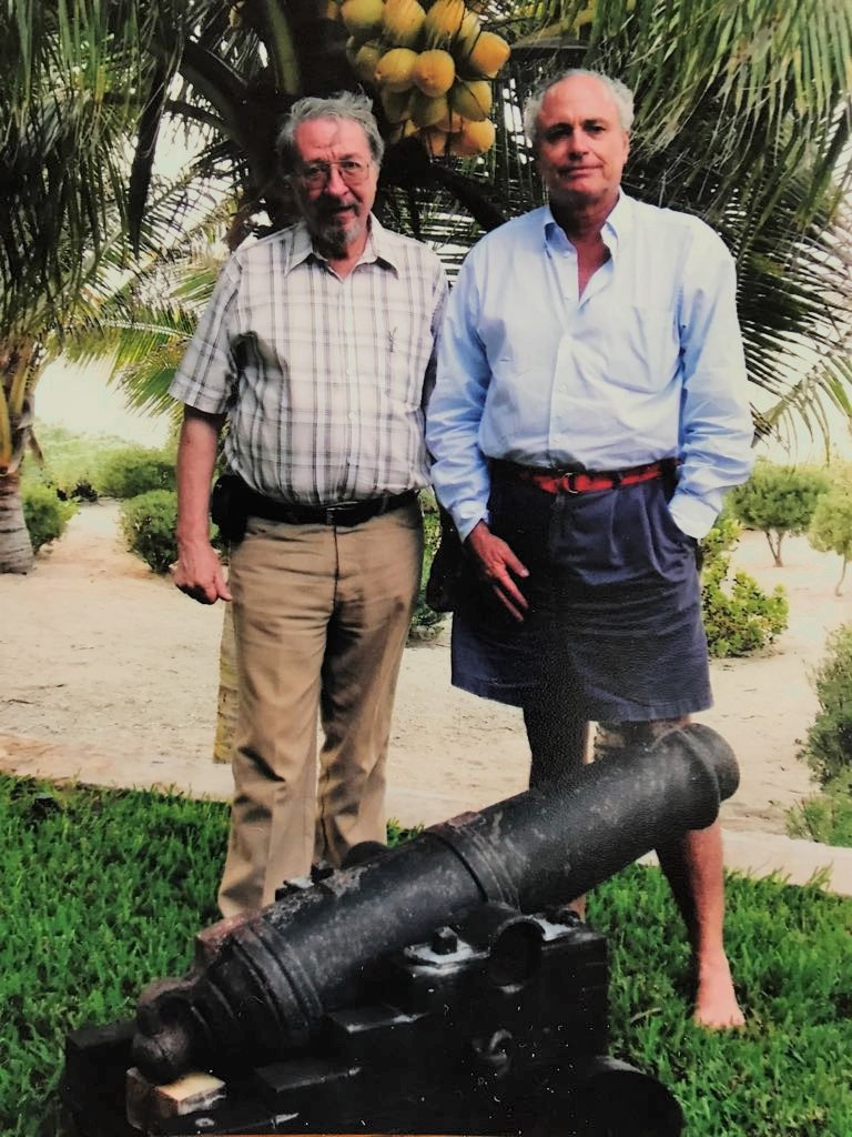 Fotografía de Michel Antochiw Kolpa & Luis Yturbe Redo en Chicxulub, Yucatán